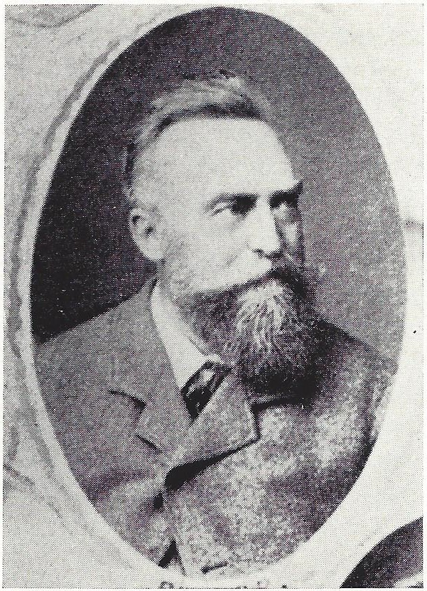 Porträtfotografie des ehemaligen Revolutionärs Wilhelm Pieper (1826-1898)